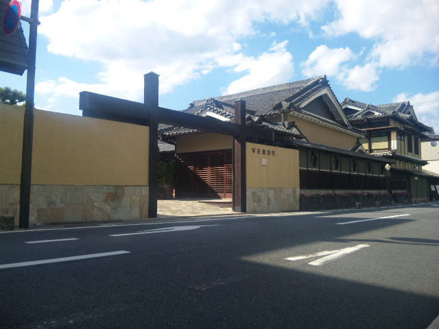 ヴェルデ辻甚（大和高田市）。